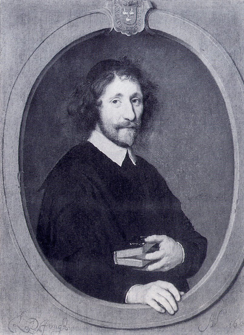 Portret van Willem de Swaen (1607/1608-1674), pastoor te Gouda